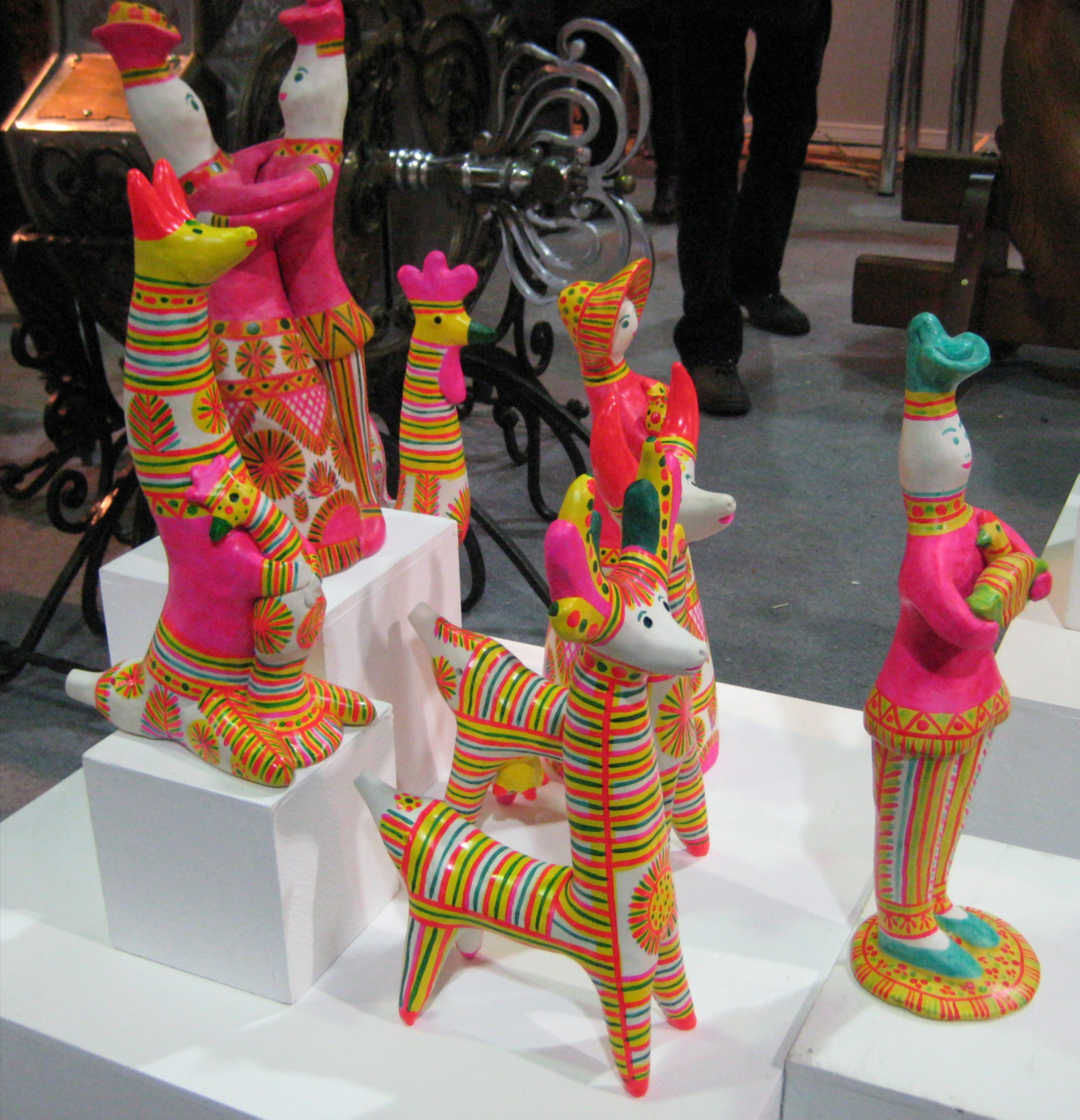 Филимоновская игрушка. "Ладья 2010"